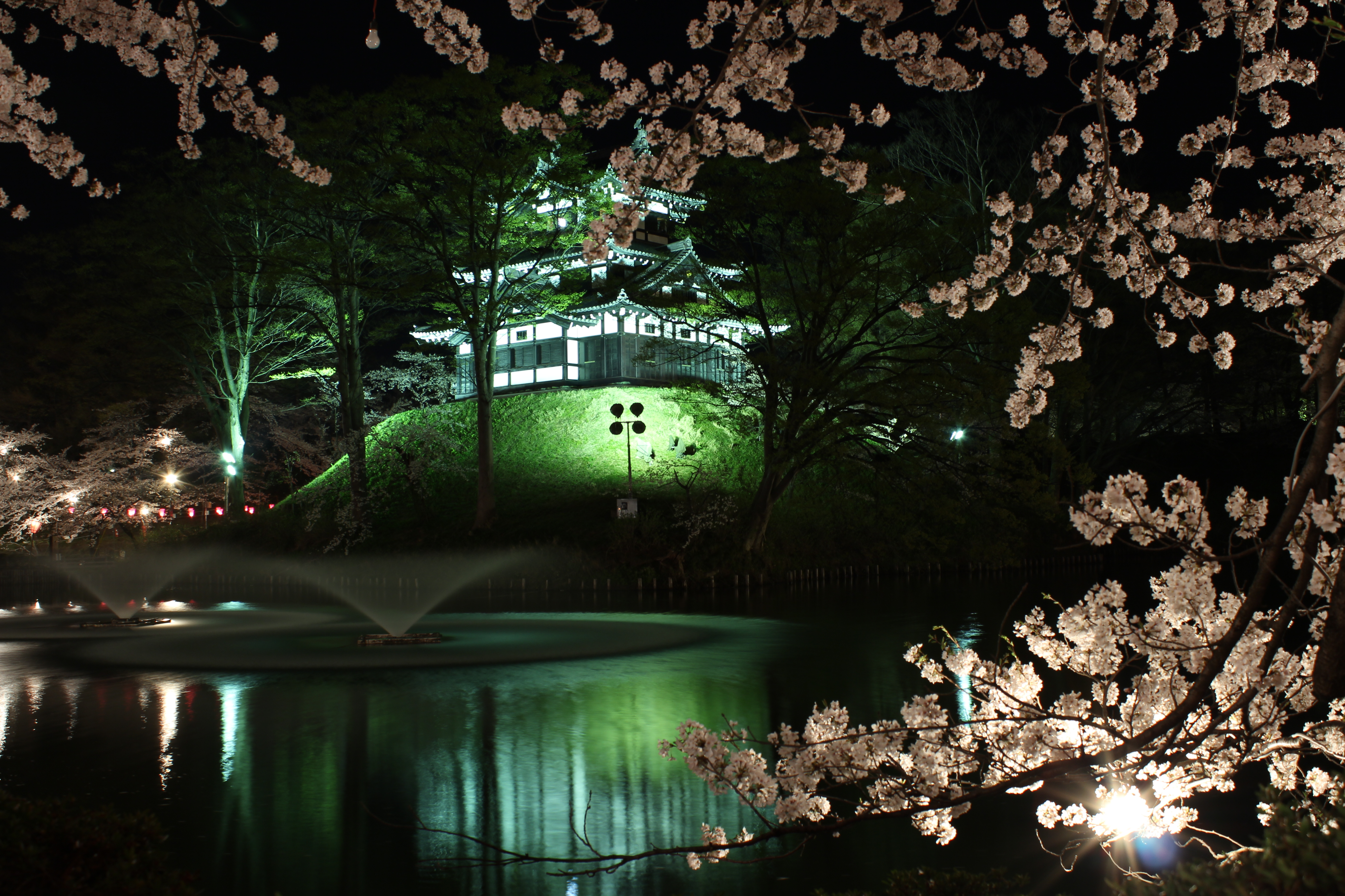 高田城三重櫓観桜会ライトアップ（南側）